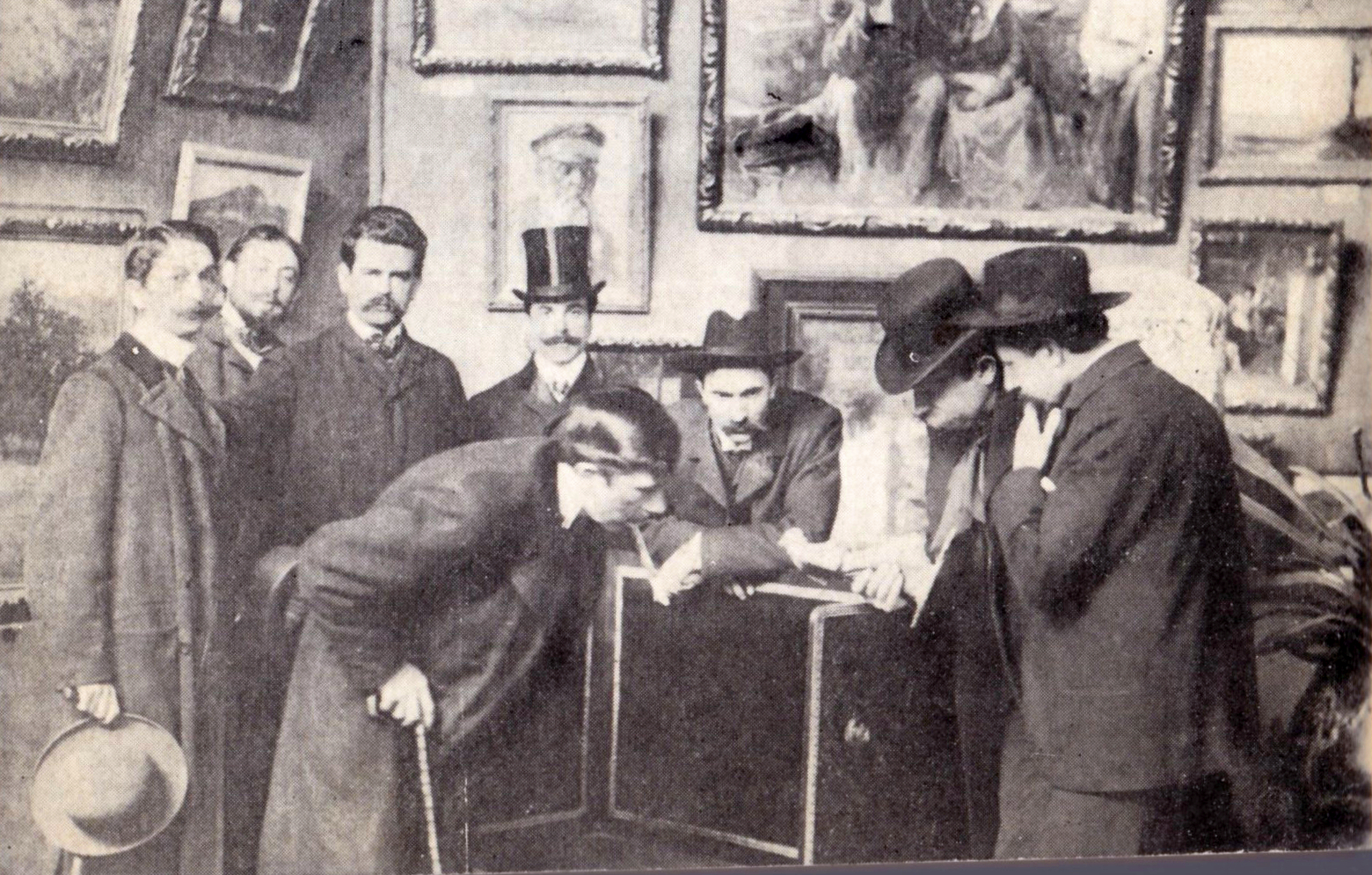 Fotografie de la Expoziția Tinerimii artistice din anul 1903. Artiștii: Constantin Artachino, Alexandru Satmari, Frederic Storck, Kimon Loghi, Oscar Spathe, Ștefan Luchian, Ipolit Strâmbulescu, Gheorghe Petrașcu - proveniență din colecția lui Petre Oprea.